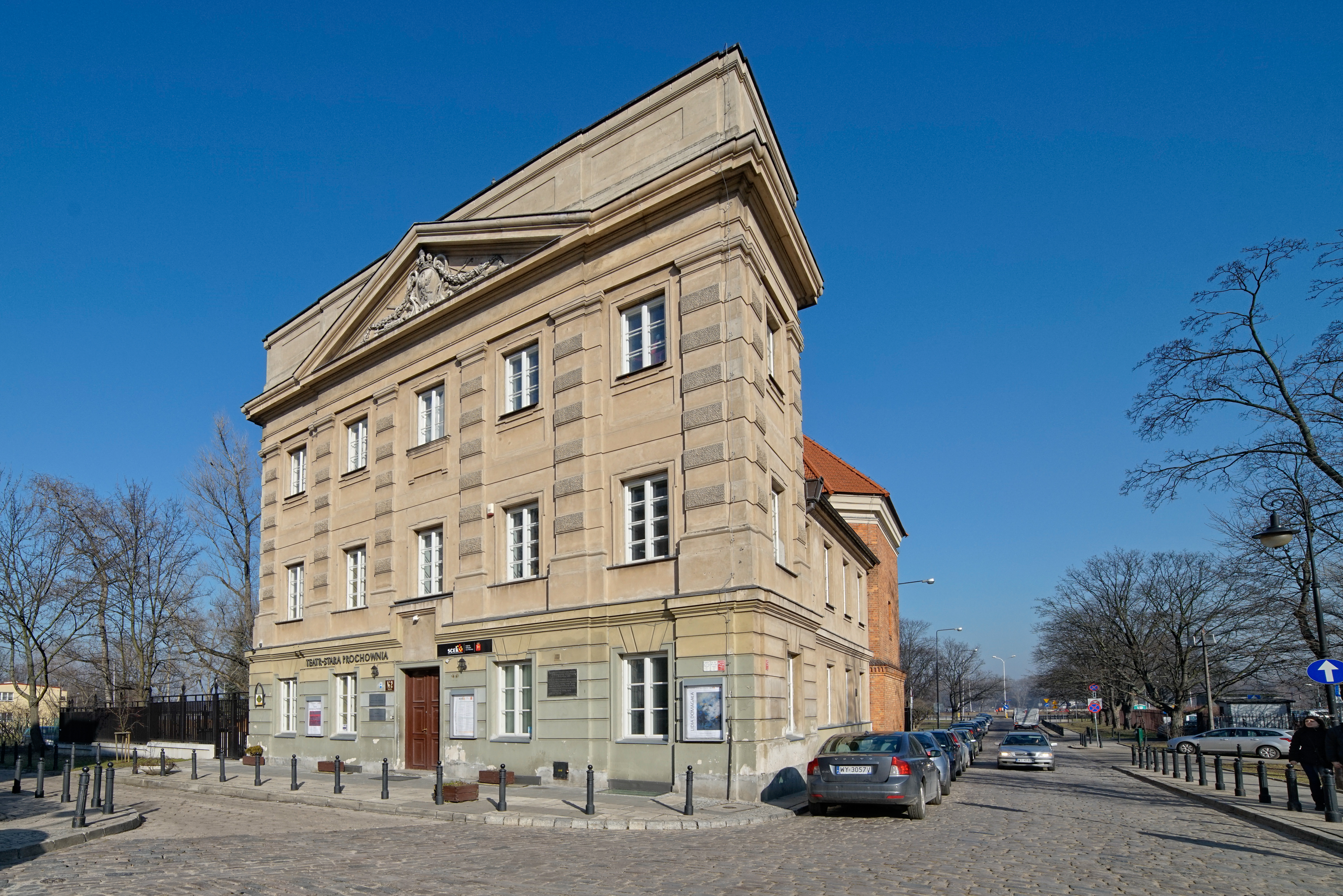 Teatr Stara Prochownia w Warszawie, ulica Boleść 2